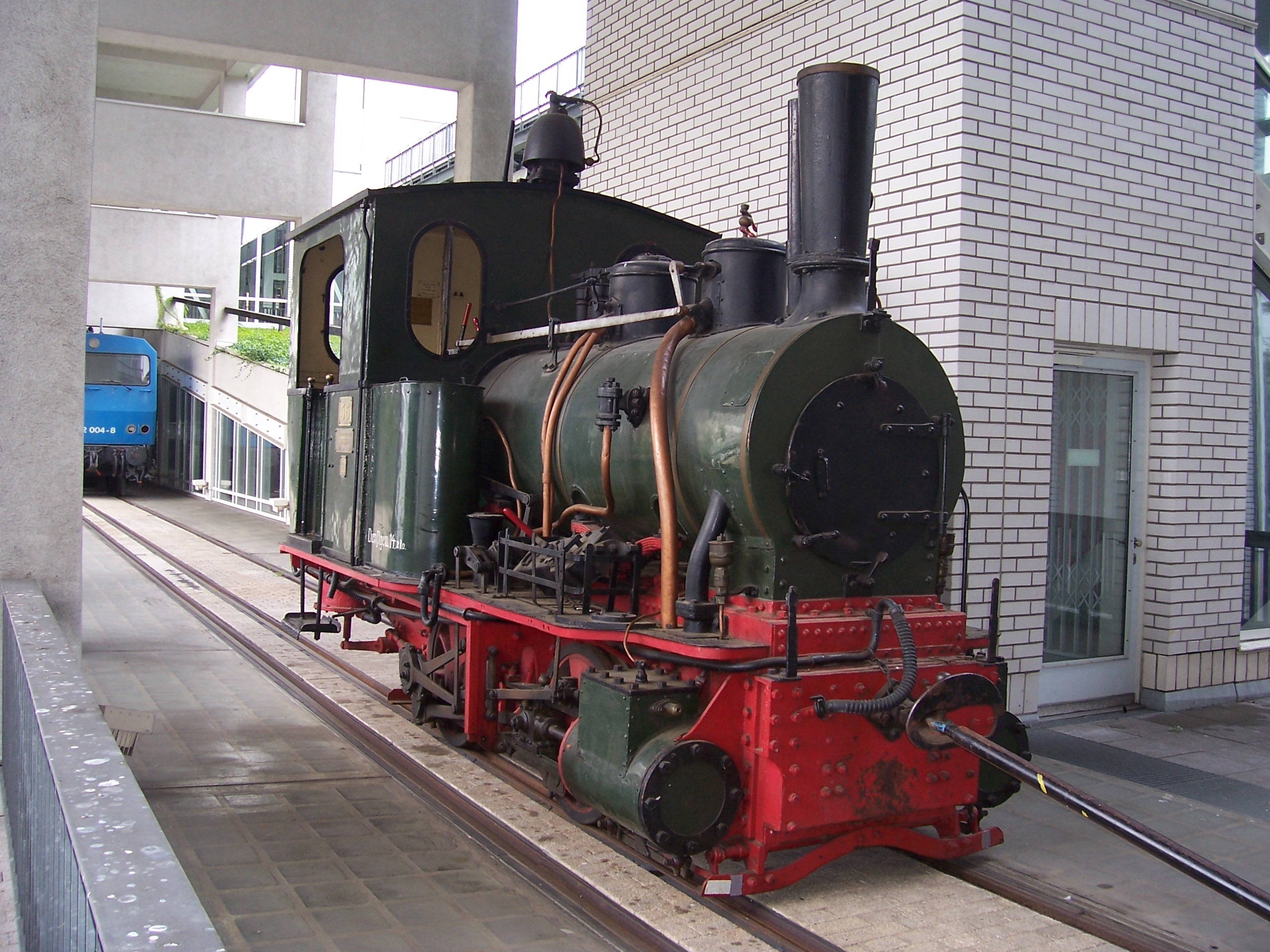 Dampflokomotive Nummer 56 der Oberrheinischen Eisenbahn Gesellschaft (OEG) im Landesmuseum für Technik und Arbeit in Mannheim. Sie wurde 1886 von der Maschinenbau-Gesellschaft Karlsruhe mit der Fabriknummer 1167 gebaut.